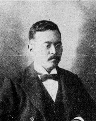 中鉢美明（1868-1936）